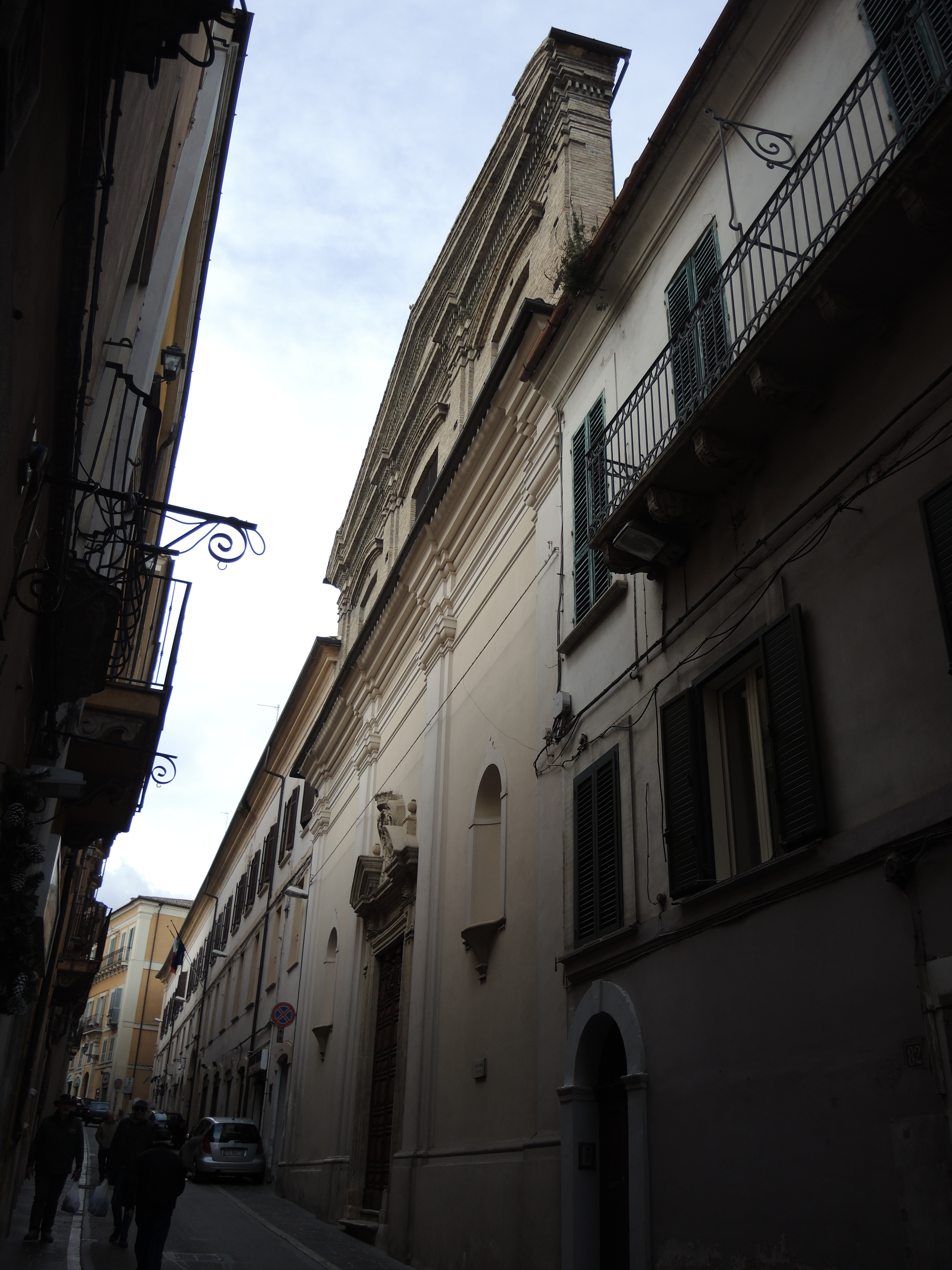 Chieti: Chiesa di Santa Chiara